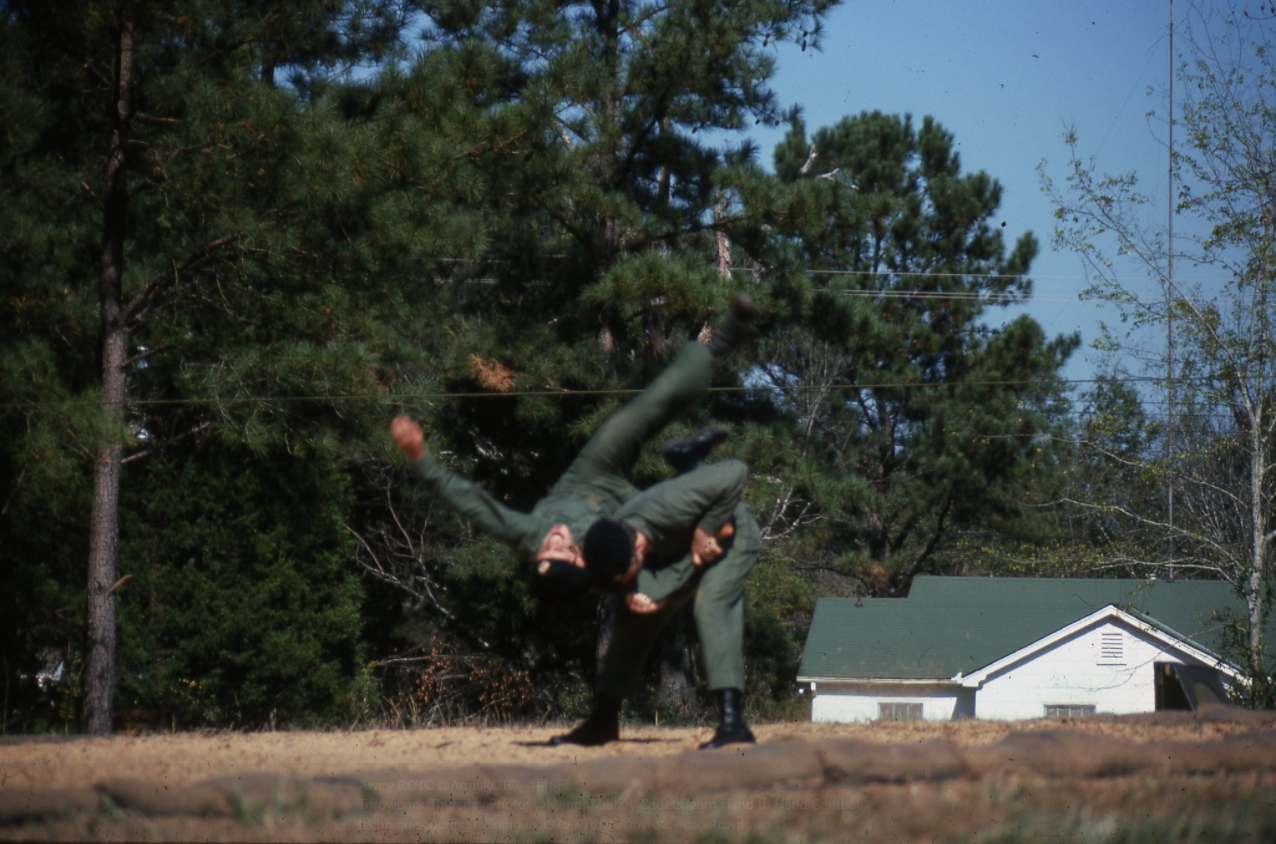 马里昂军事学院学员练习格斗